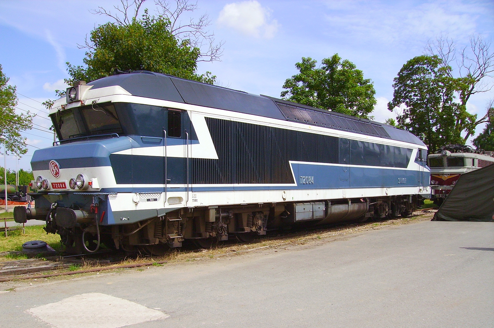 La CC 72084 aux Journées Portes Ouvertes du 5ème Régiment du Génie de Versailles le 14 juin 2009.